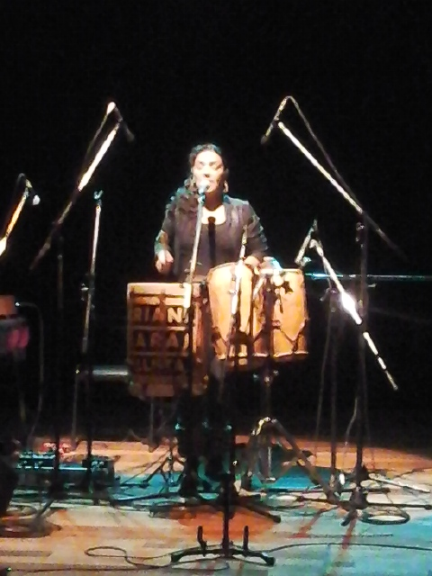 Mariana Baraj en Mendoza (2016).